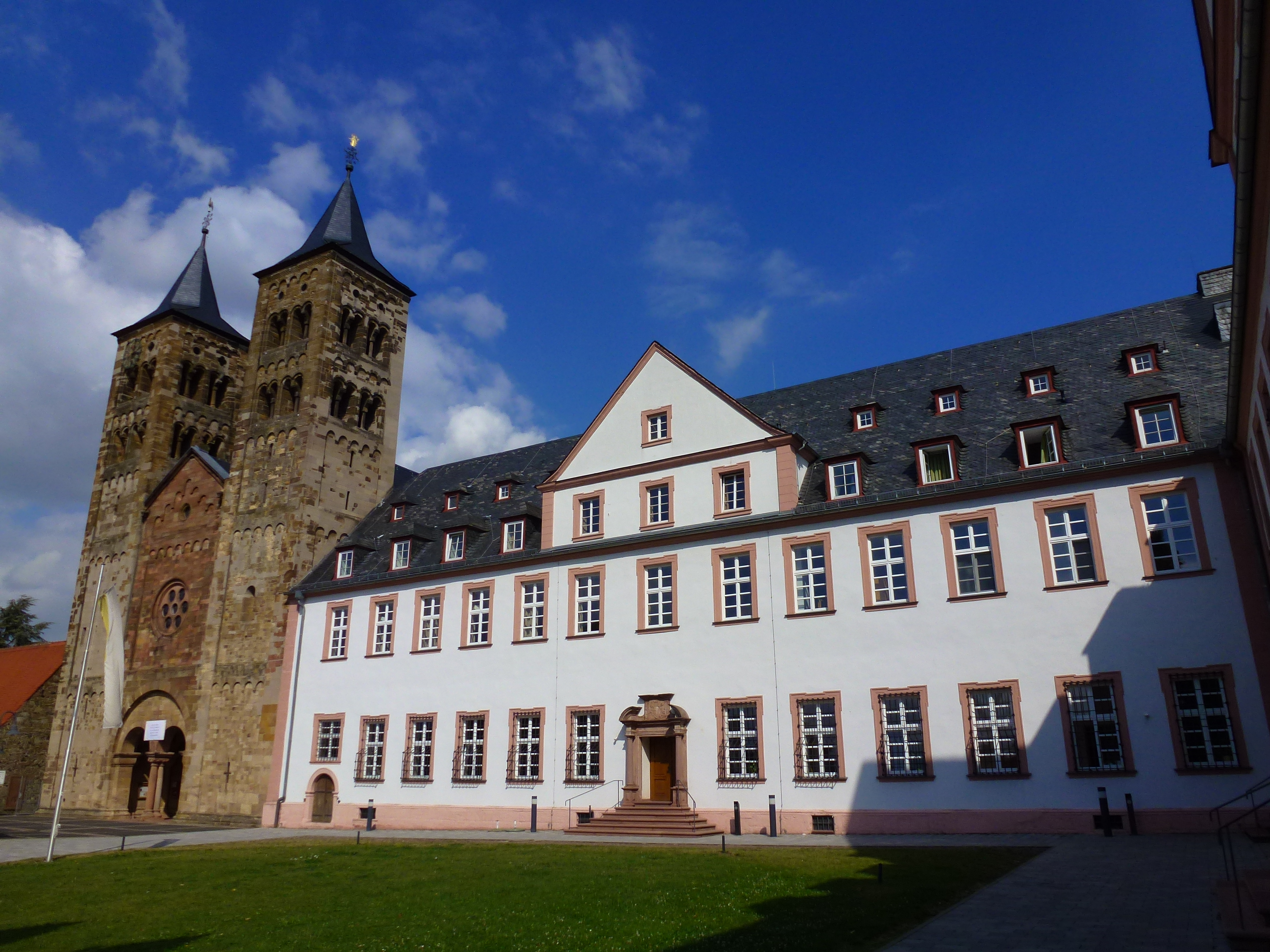 Katholische Pfarrkirche Ilbenstadt. Ehemalige Klosterkirche St. Maria, St. Petrus und St. Paulus des Klosters Niddatal Ilbenstadt